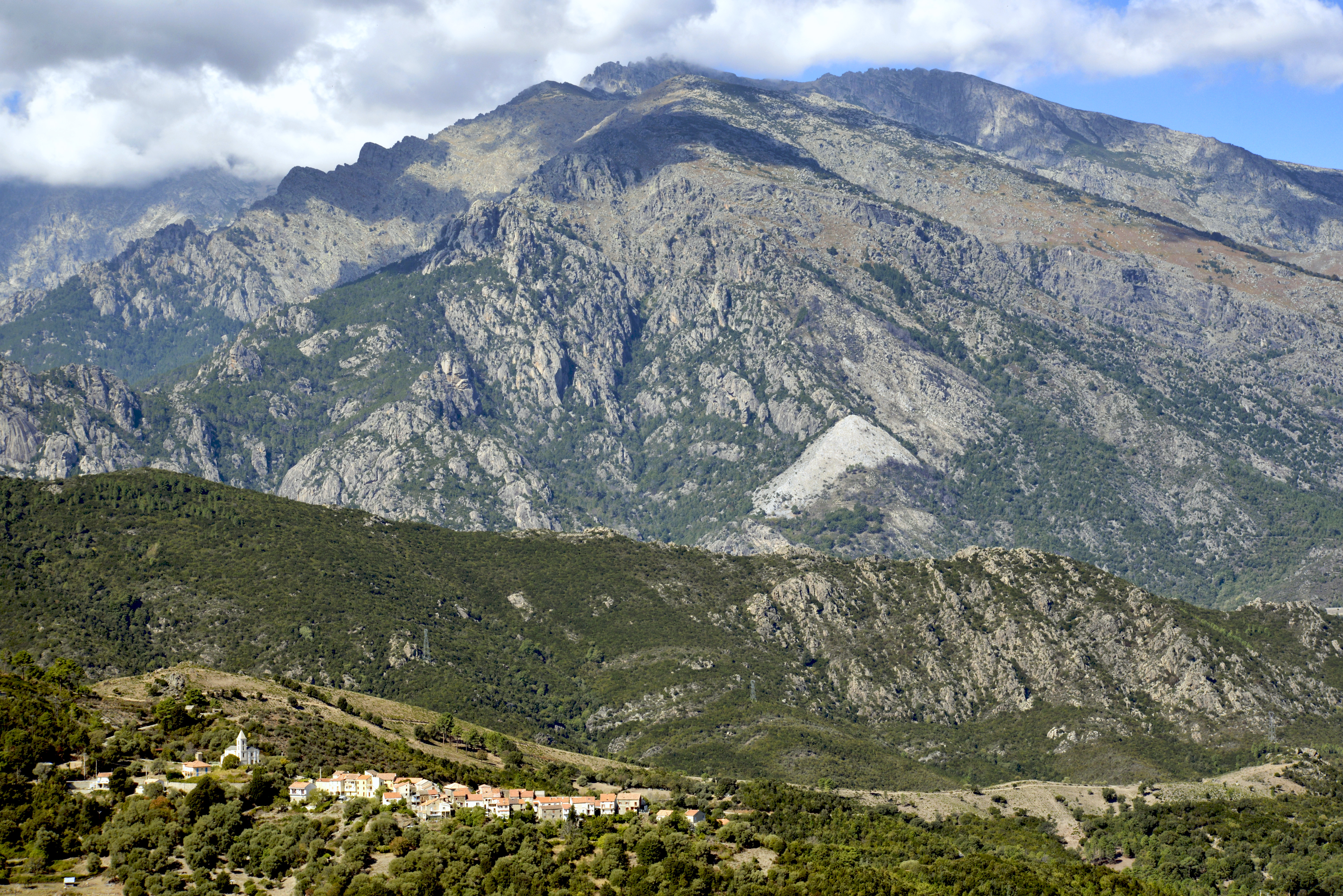 Venaco, Centre Corse (Haute-Corse) - Le Razzo-Bianco (Razzu Biancu) cône de marbre blanc au flanc E-SE du Monte Cardo (2453 m). Au premier plan, le village de Noceta. Vue depuis le col de Croce (Noceta)